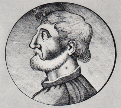 Marsilius von Inghen, Theologe und erster Rektor der Uni Heidelberg